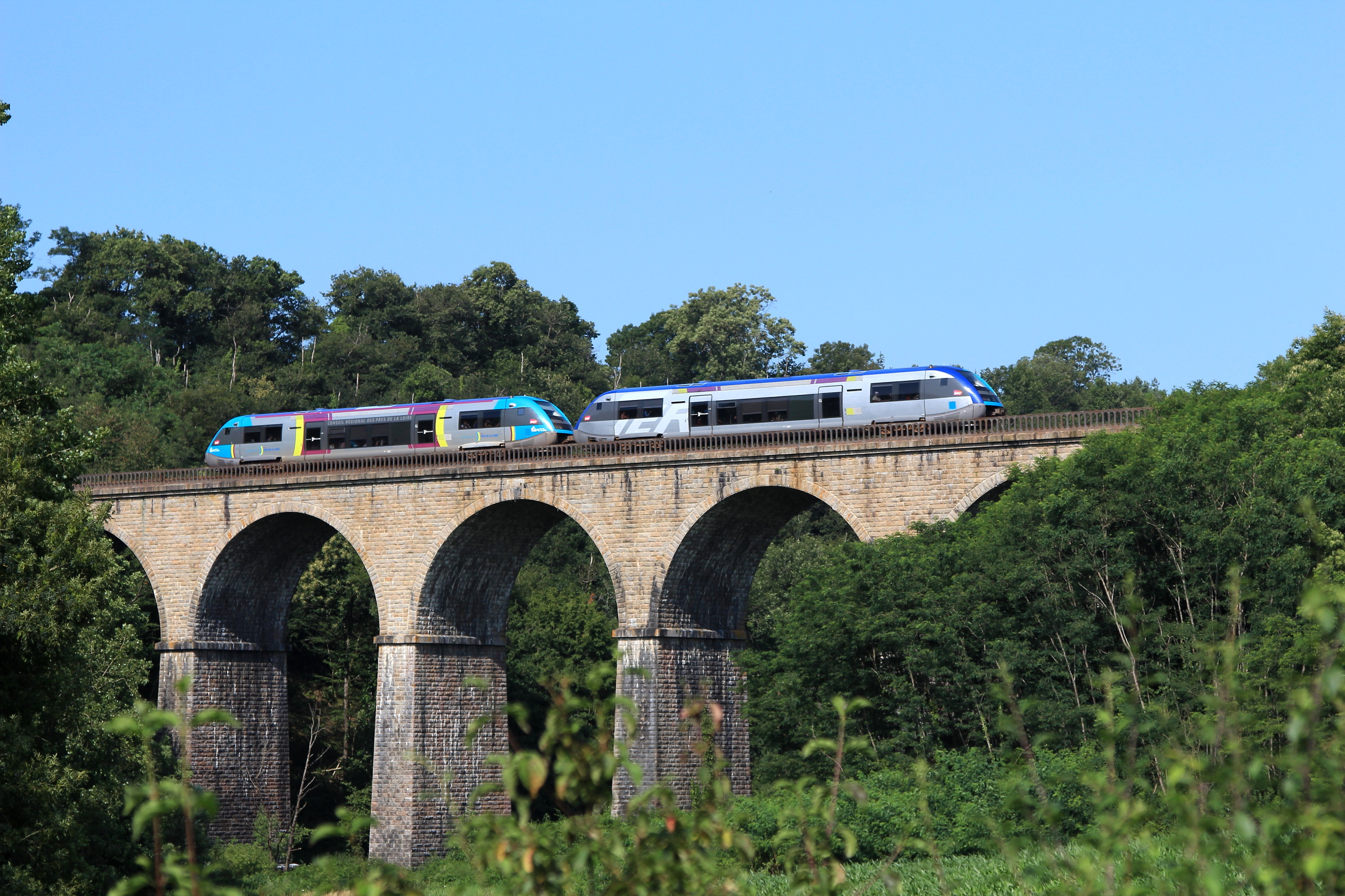 UM d'X 73500 sur le TER 859081 (Saumur - Les Sables-d'Olonne, "train des plages") sur le viaduc de l'Angle, entre Chantonnay et La Roche-sur-Yon.